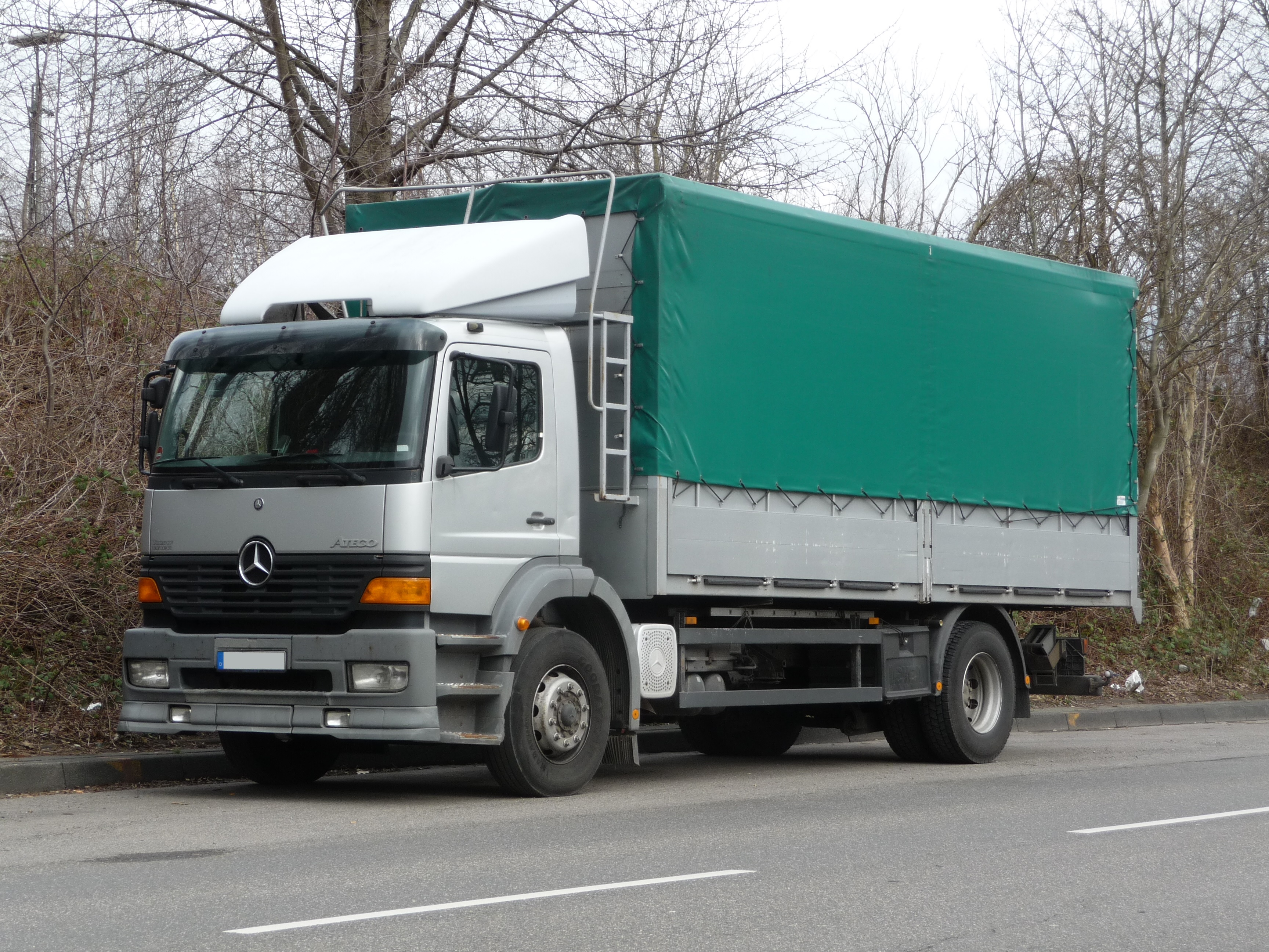 Mercedes Atego 1828 Pritschen-Lkw